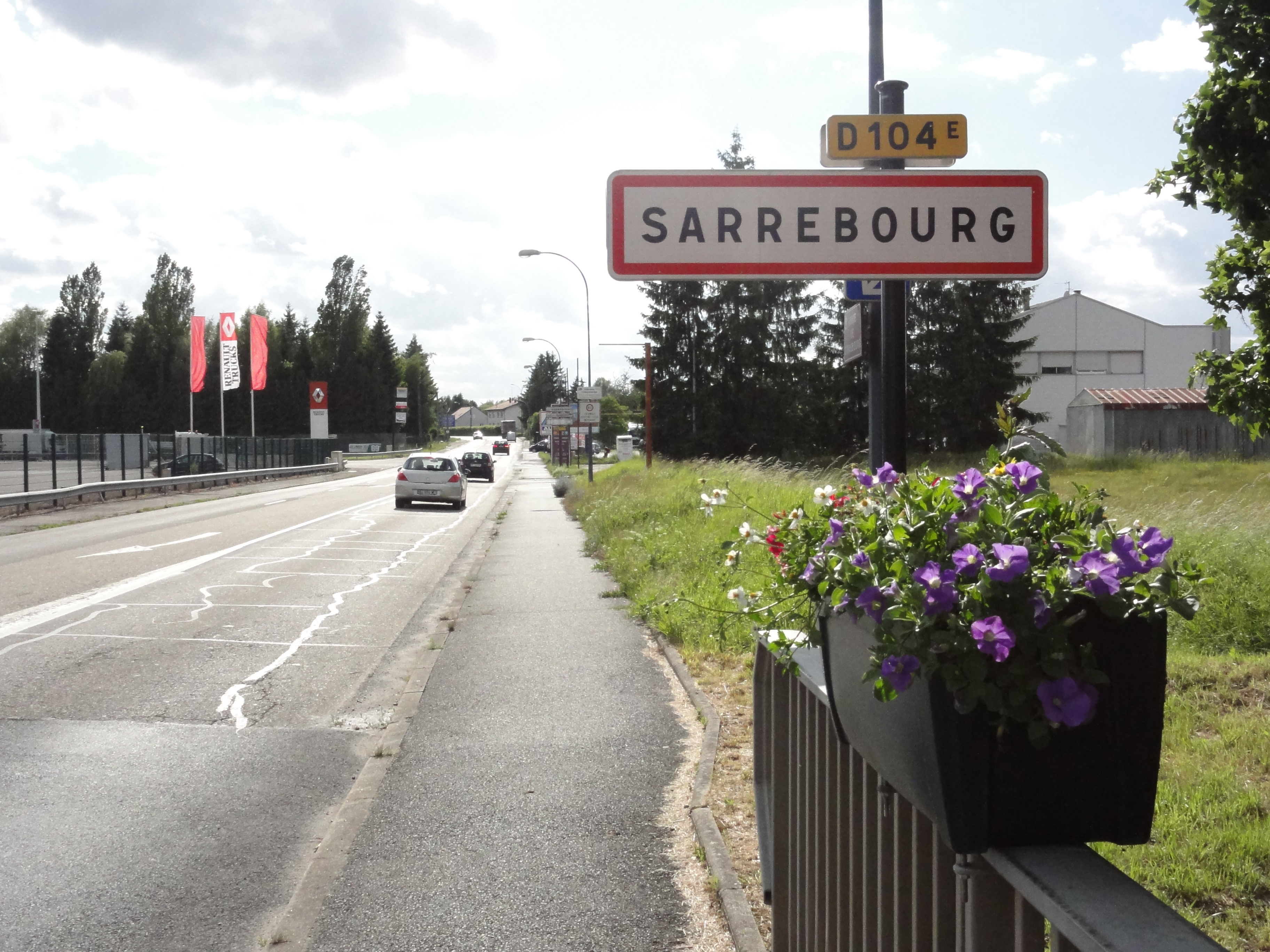 Sarrebourg (Moselle) panneau d'entrée